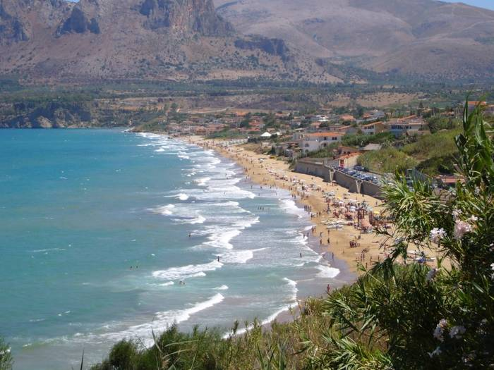 Der Sandstrand "Ciammarita" von Trappeto